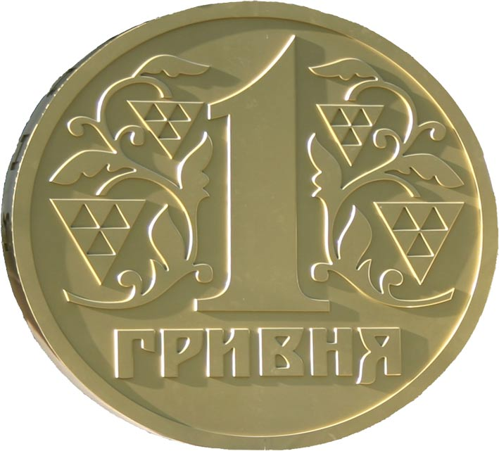 1-Hryvnia-coin, Ukraine